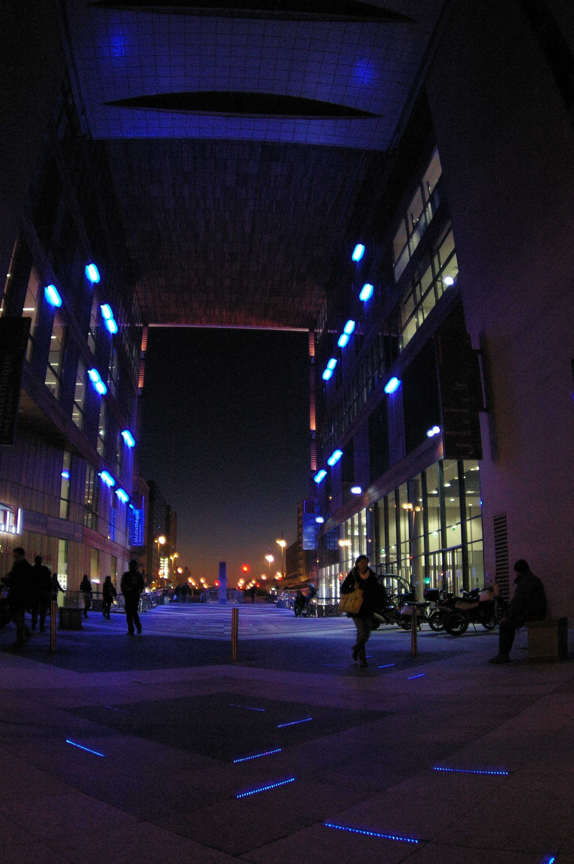 Médiathèque José Cabanis à Toulouse.